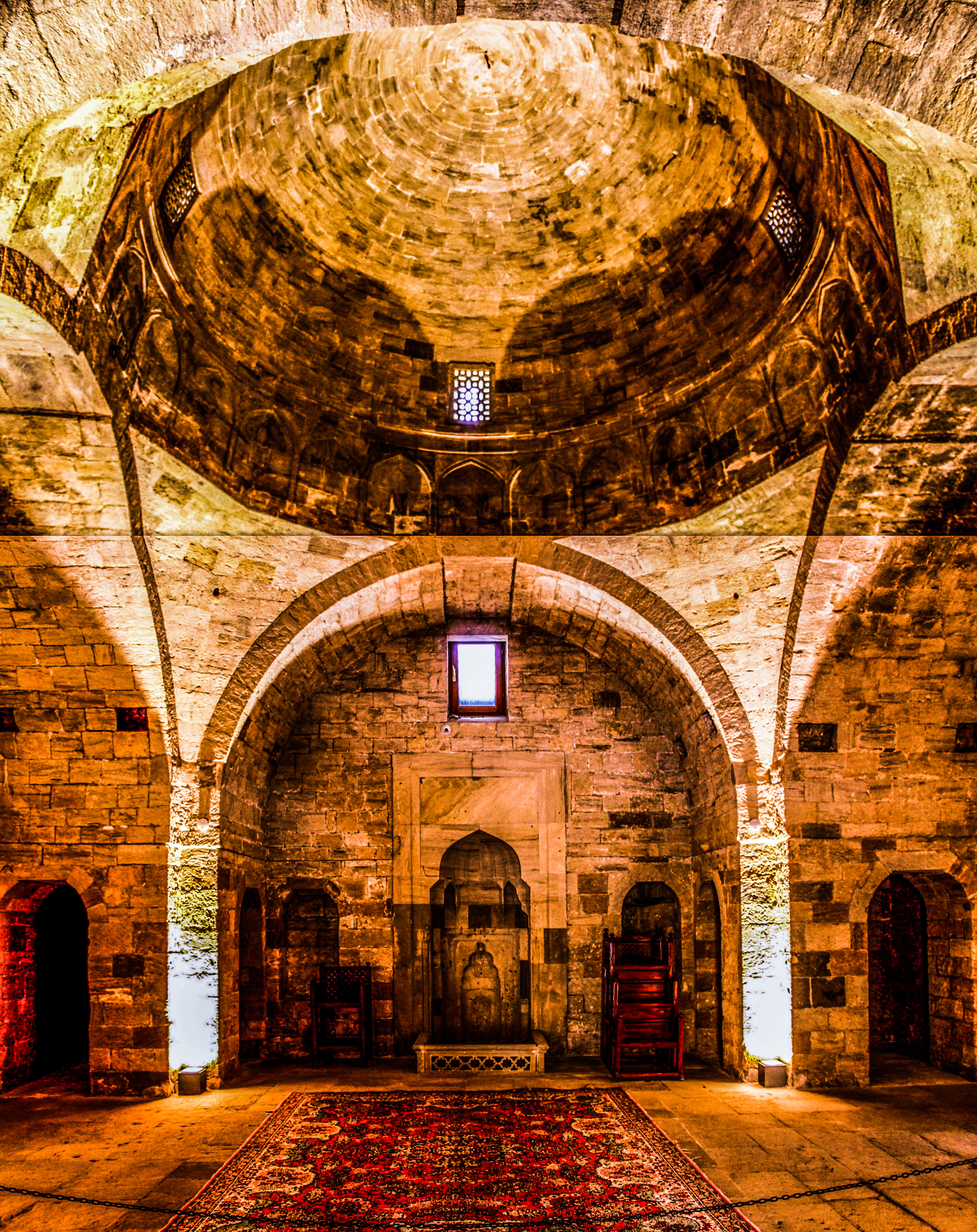 Şirvanşahların saray məscidinin interyeri